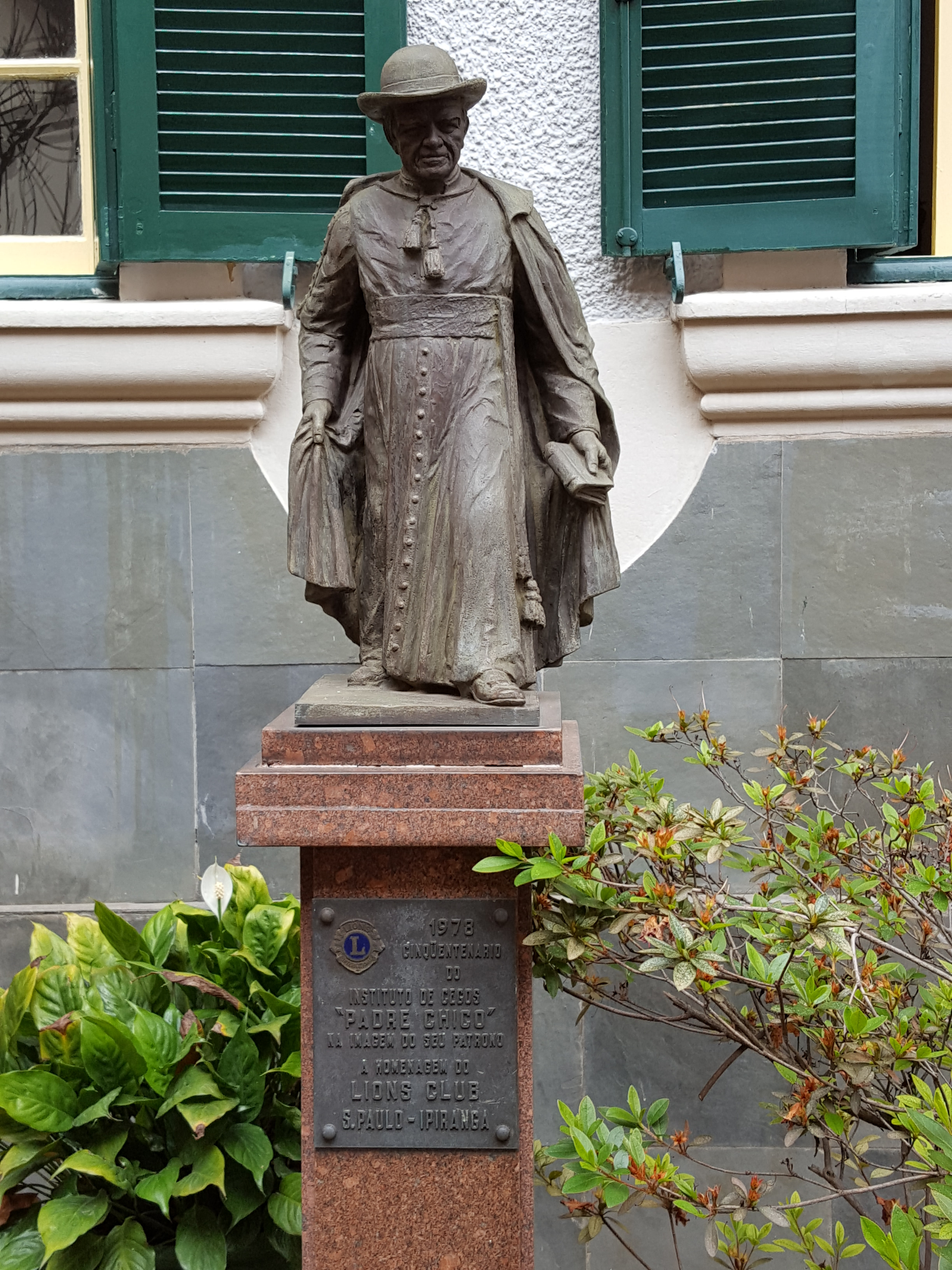 Escultura de Padre Chico, localizado na parte interna do corredor de entrada do Instituto Padre Chico, em São Paulo (SP), Brasil.